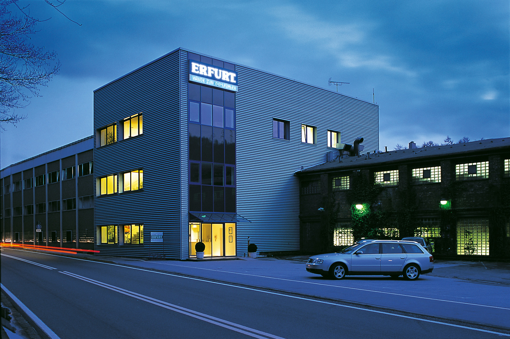 Firmengebäude des Unternehmens Erfurt & Sohn, Gebäude an der Wupperstraße in Schwelm